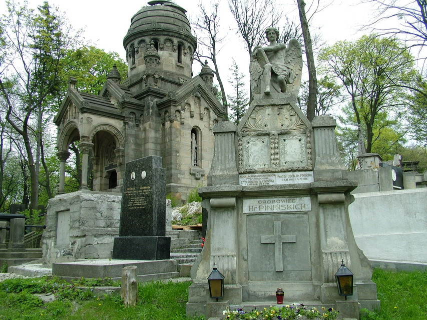 Pniński family tomb at the Łyczaków cemetery in Lwów